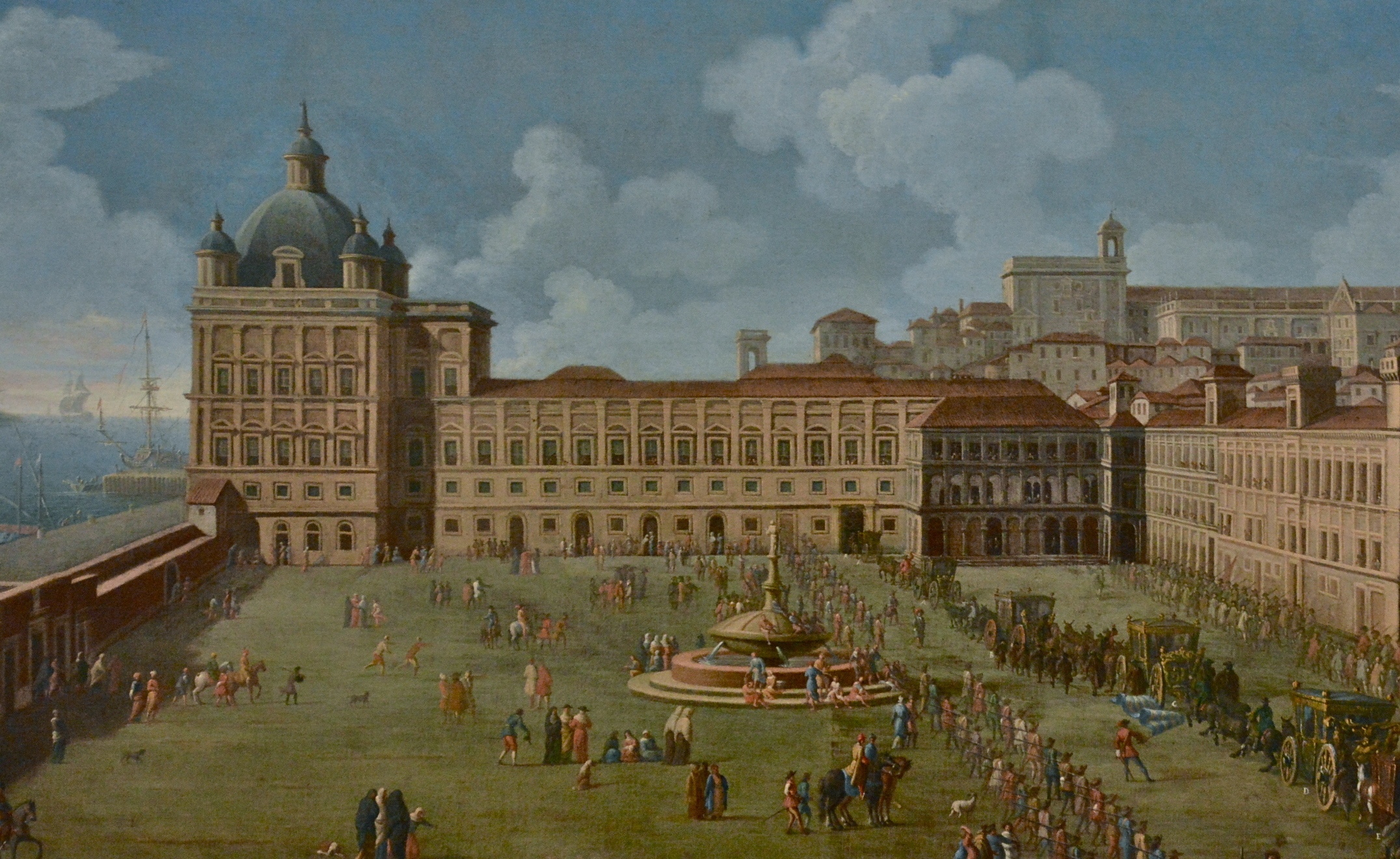 Museu dos Coches